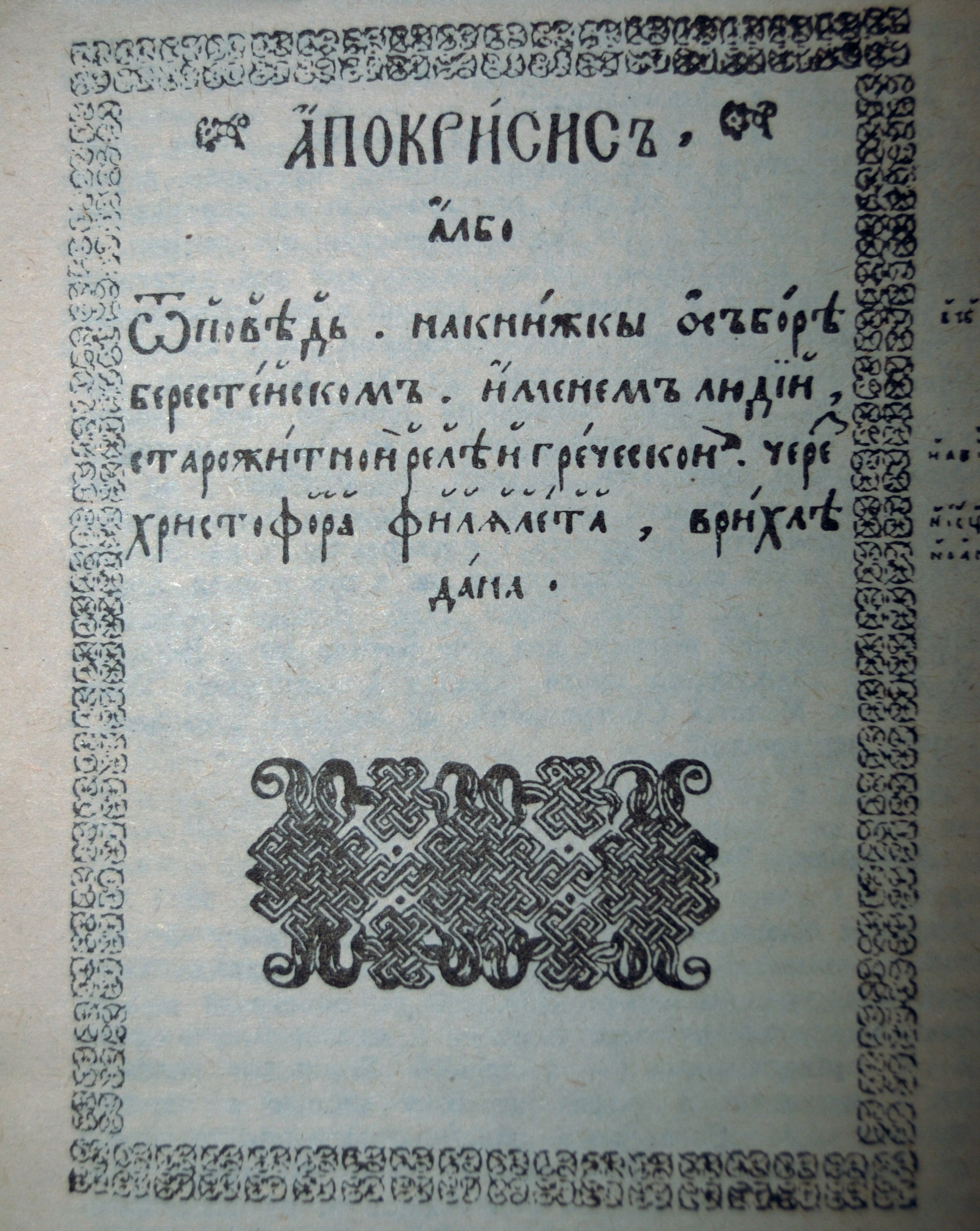 Тытульная саронка Апокрысіса